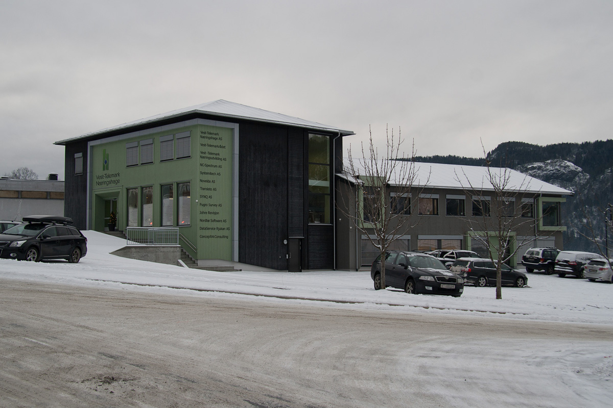 Vest-Telemark Næringshage i Kviteseid.